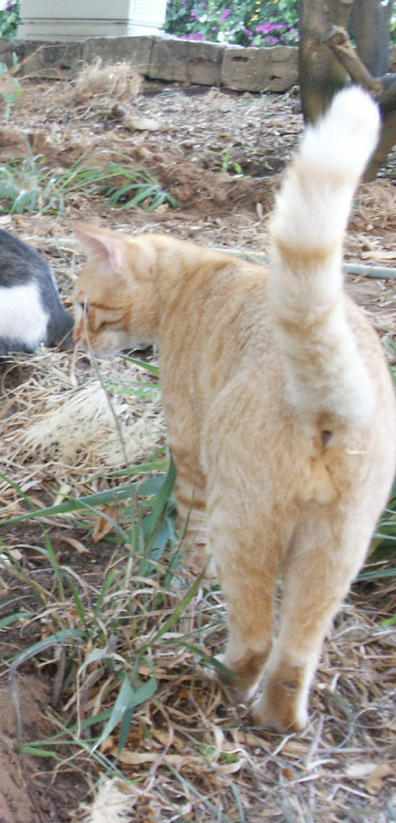 חתול זכר מסורס